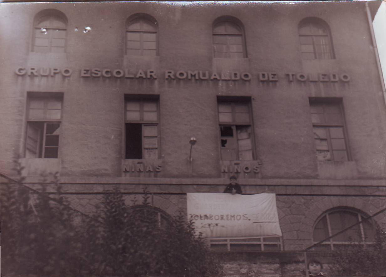 Larratxo 1977ko abendua. Haurtzaindegia eskatzeko manifestazioa